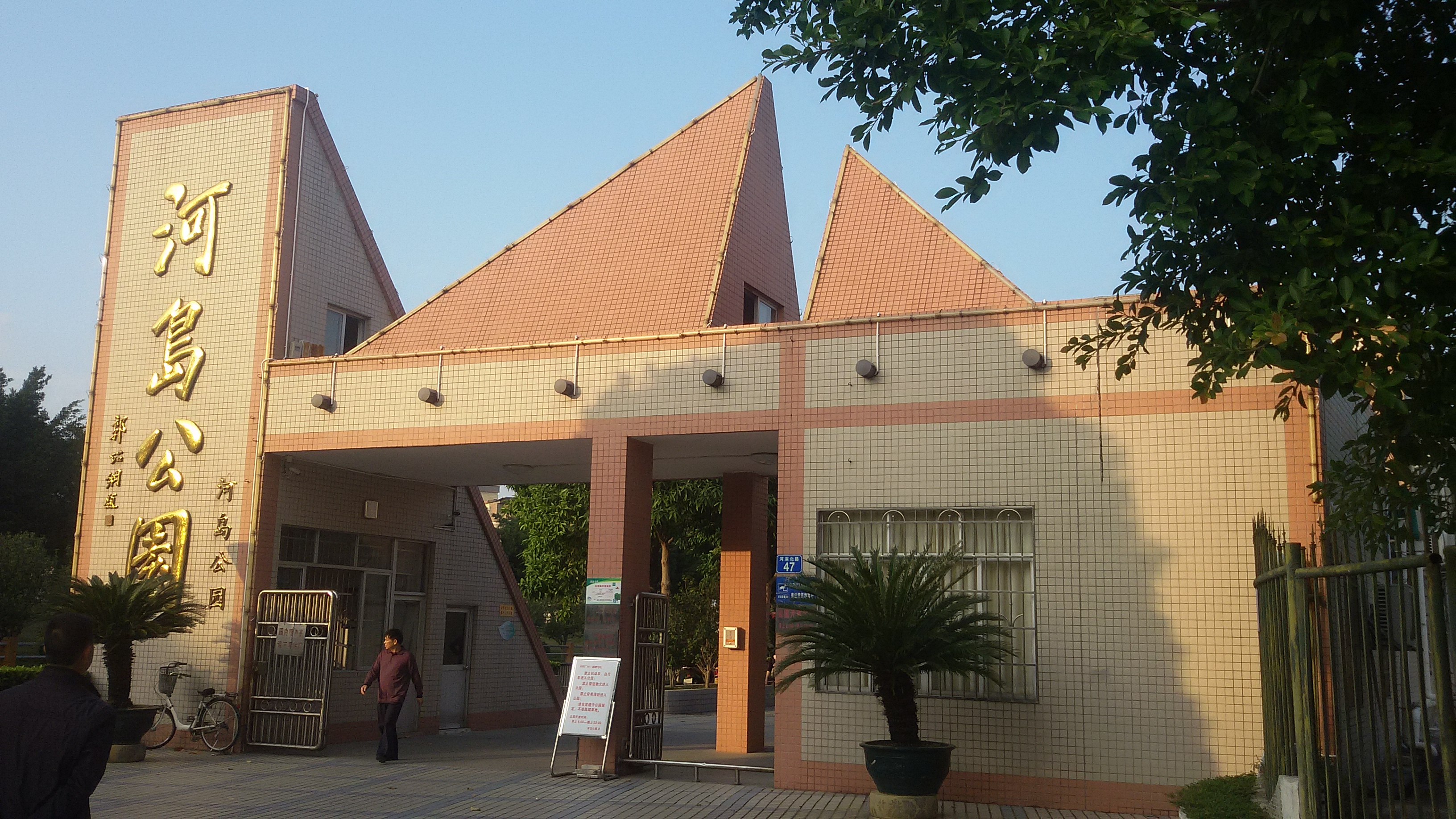 粵語: 河島公園南門